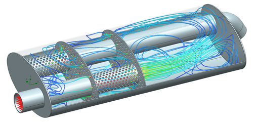 Stromlinien in einem Auspufftopf